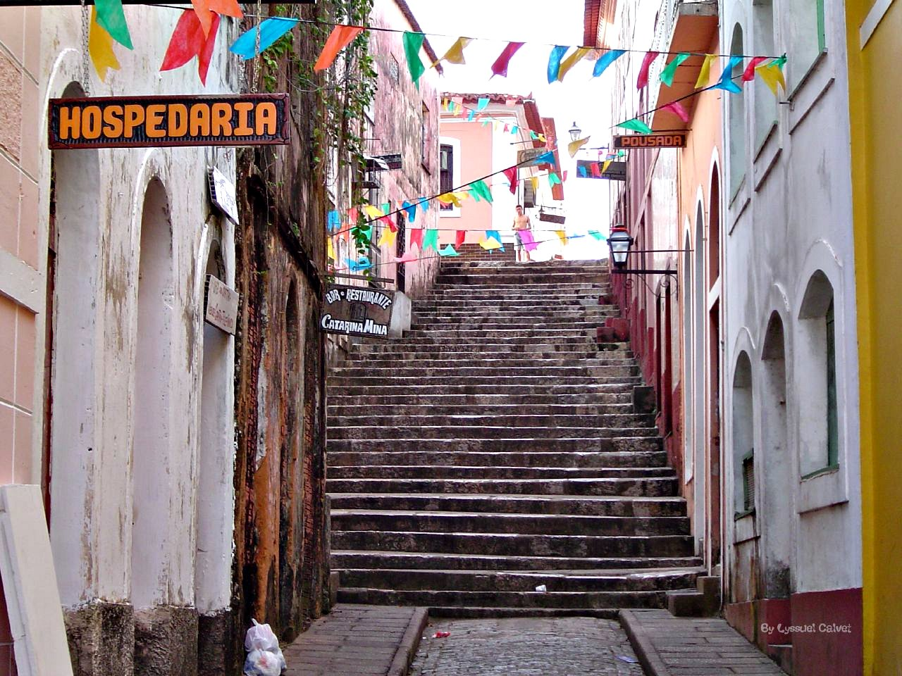 Projeto Reviver no Centro de São Luís